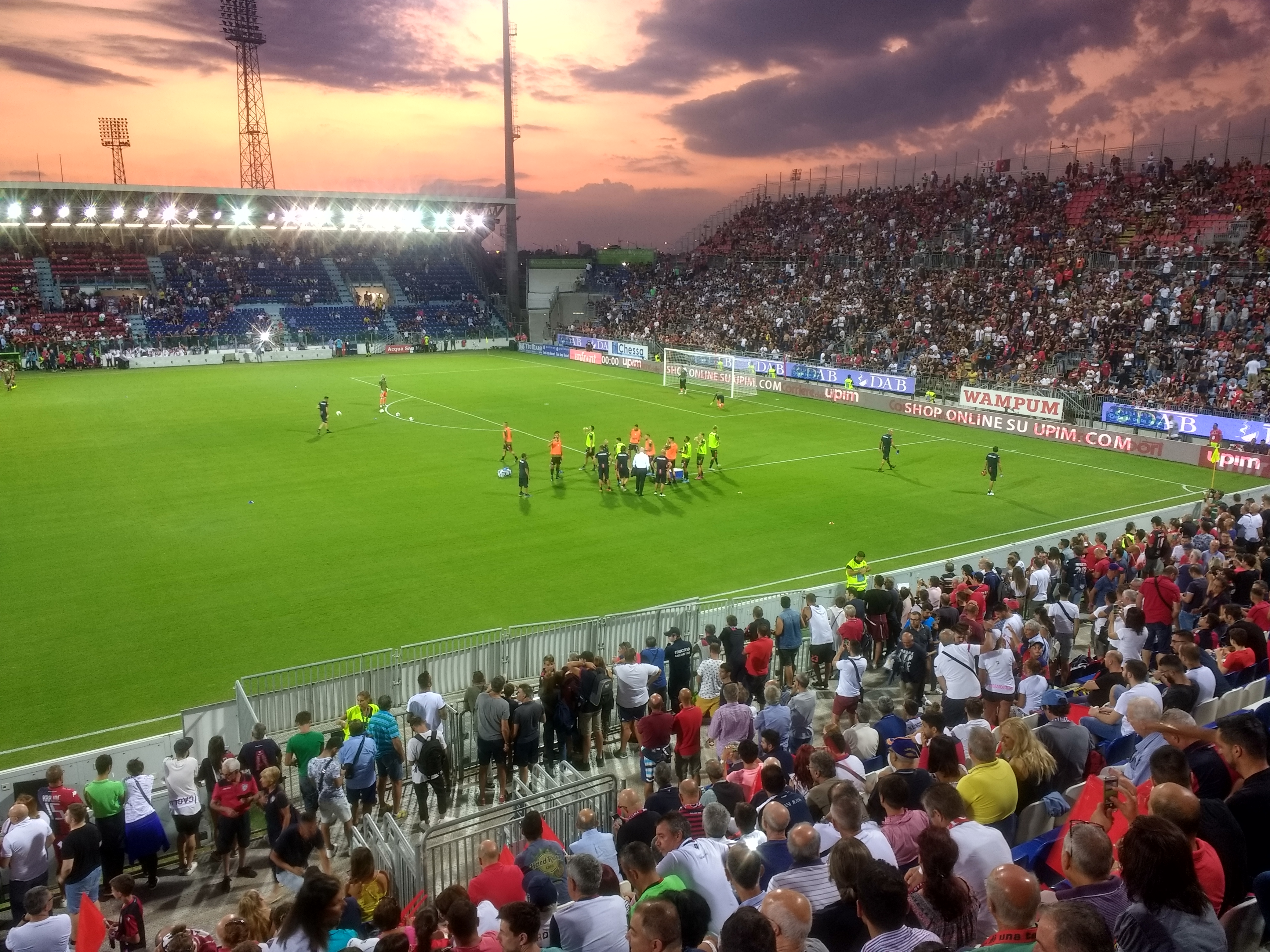 Cagliari Calcio starting team during warm-up before Cagliari-Brescia at Sardegna Arena (Serie A 2019-2020).